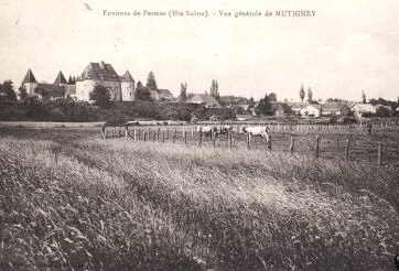 Château de Mutigney - Jura - France, vers 1910